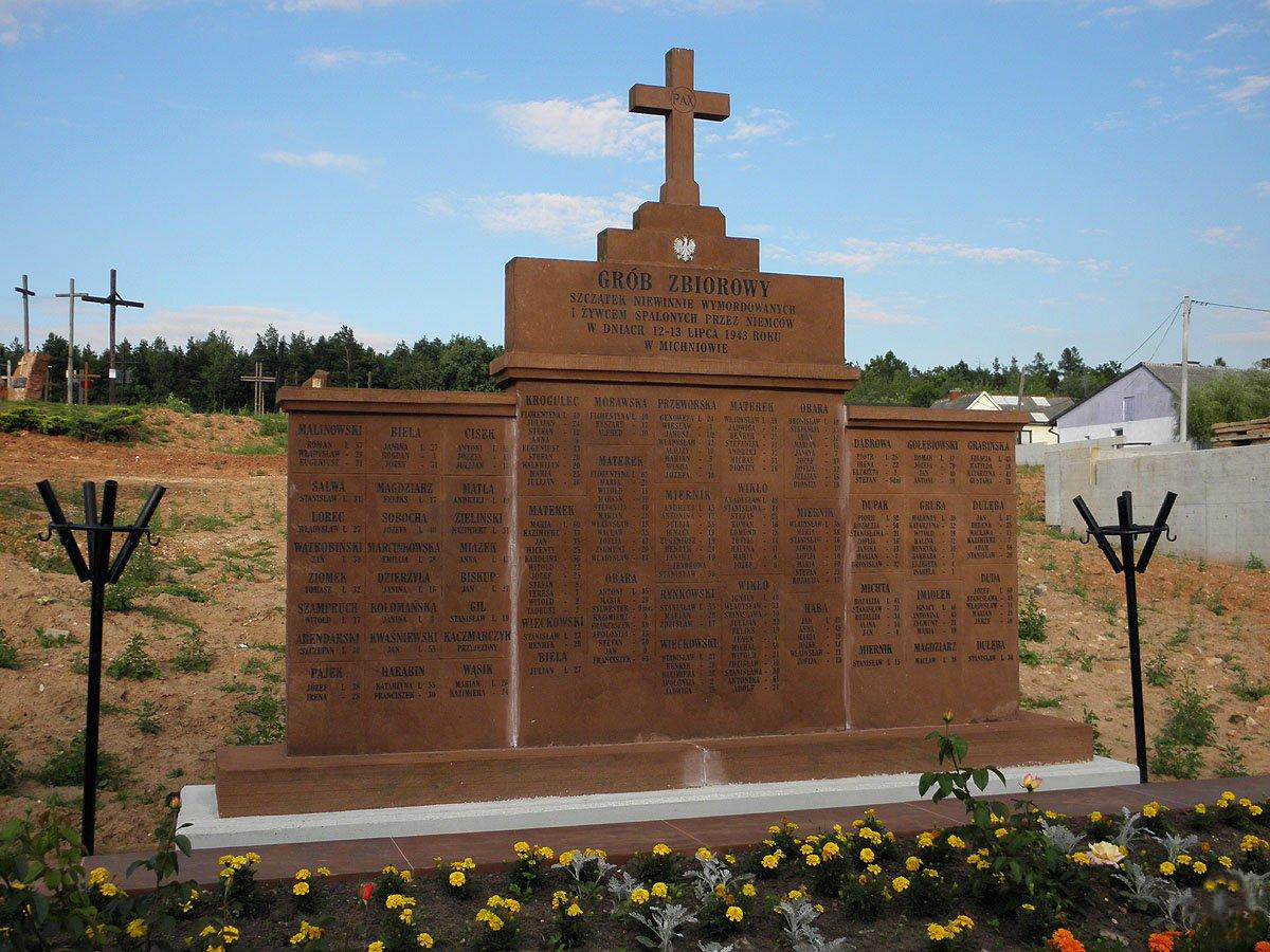 Zbiorowy grób mieszkańców Michniowa